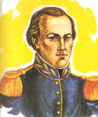 Domingo de Monteverde